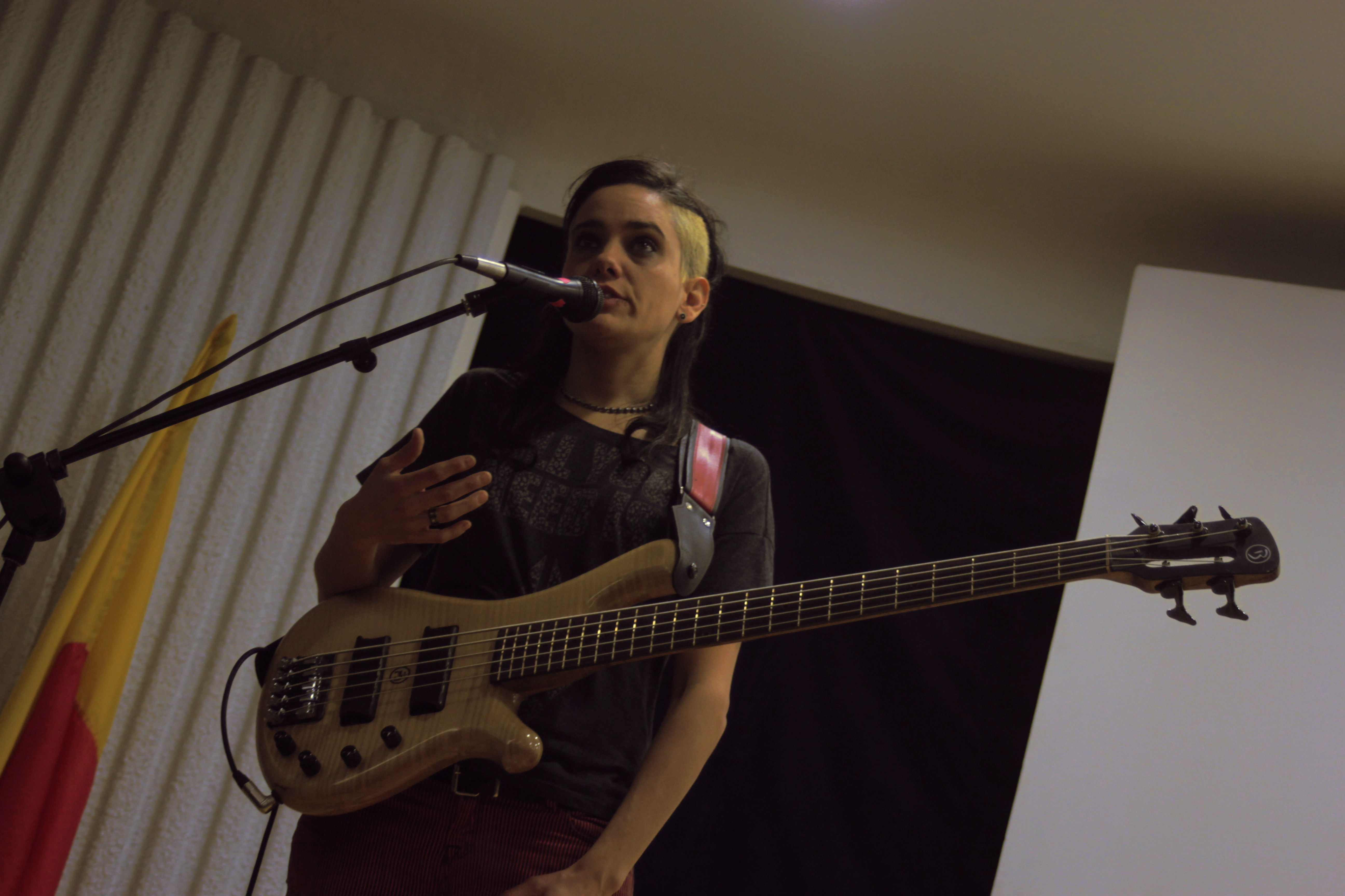 Brenda Martin, bajista y vocalista del grupo de rock Eruca Sativa en 2013.